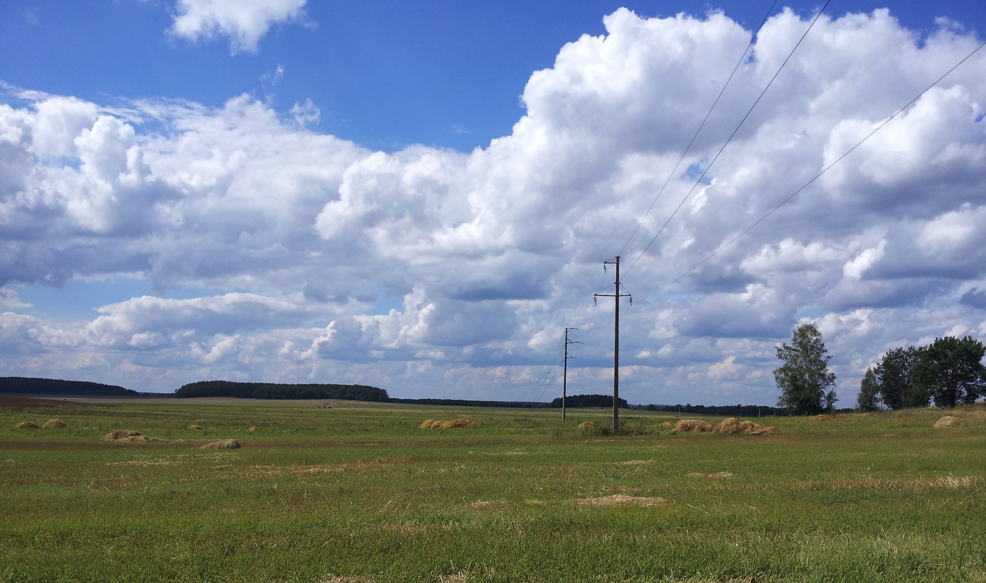 Вид окрестностей на въезде в село Костобоброво